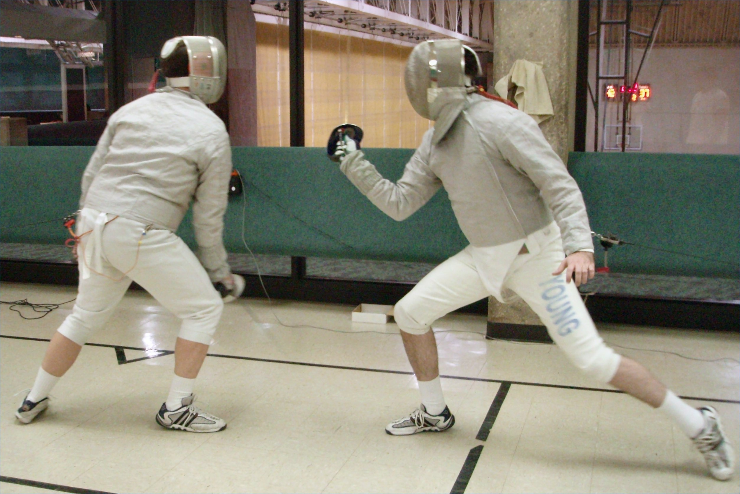 Sabre fencing